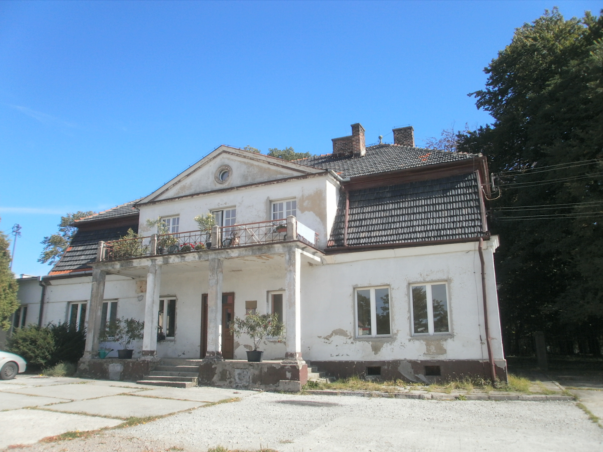 Polanka Hallera - zespół dworski: dwór, czworak, park, dwa zespoły zabudowań gospodarczych przy wewn. dziedzińcach /kuźnia, stajnia, obora, chlew, stodoła, spichlerz, magazyn/ + teren zw. przylaskiem „Dębina” ze stawem (zabytek nr rejestr. A-607/M)